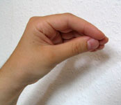 Chinesische Zahl Sieben